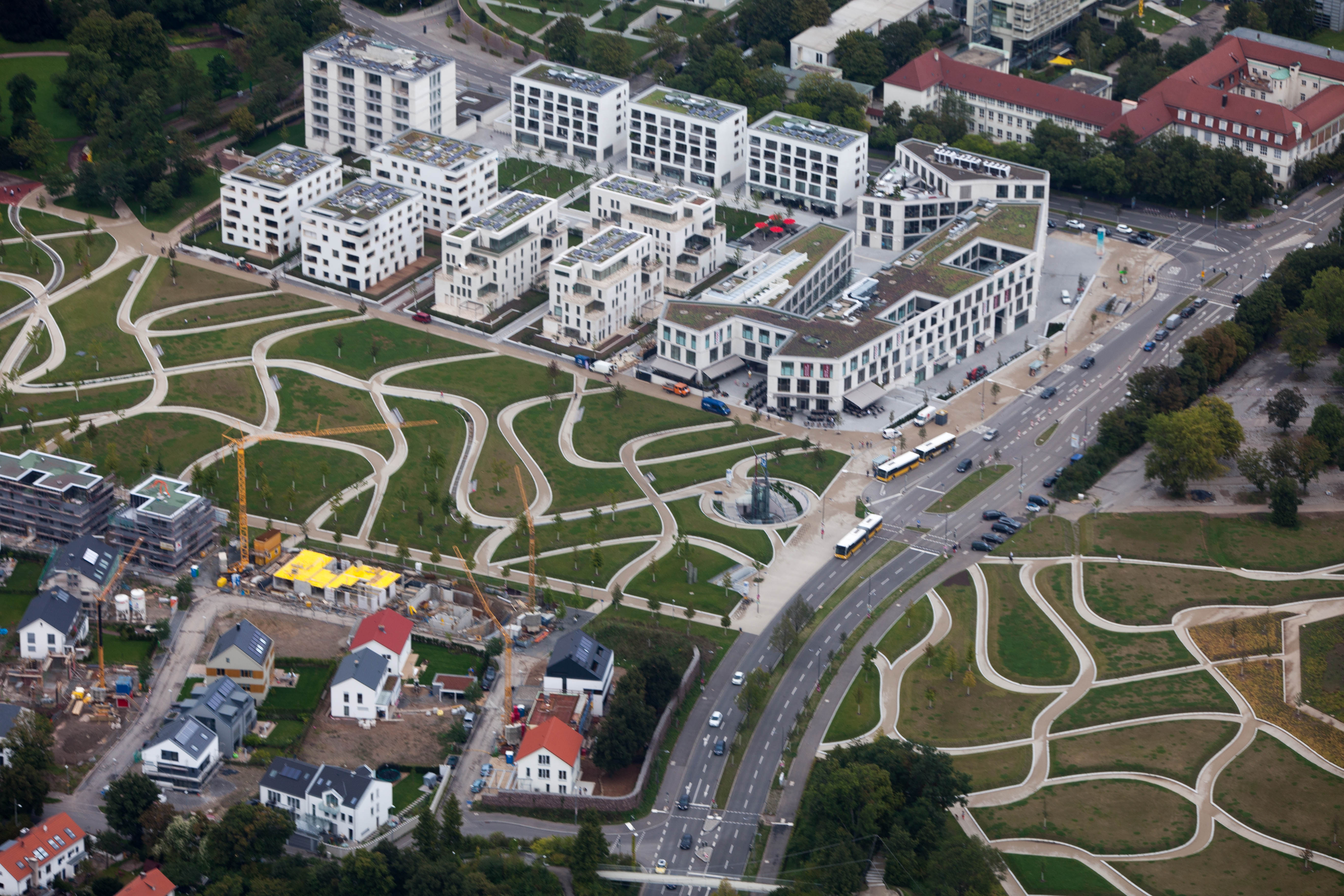 Artificial meander